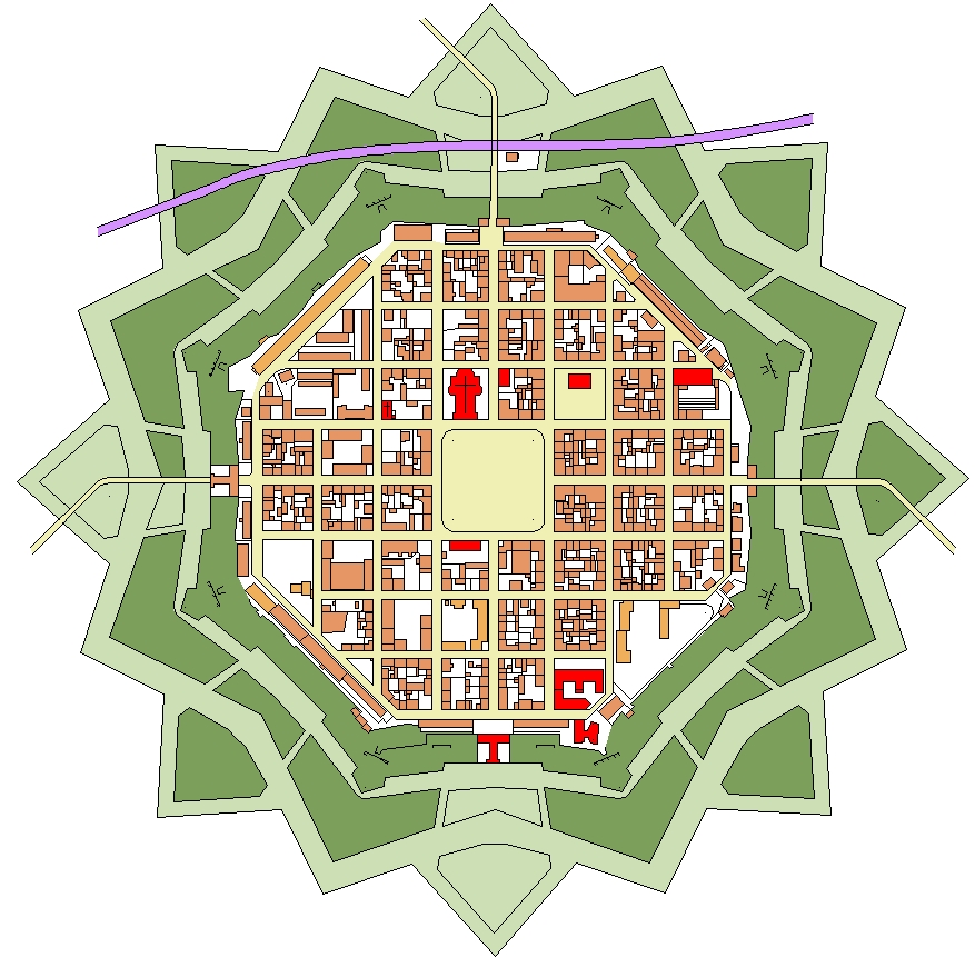 Stadtplan von Neuf-Brisach (68)